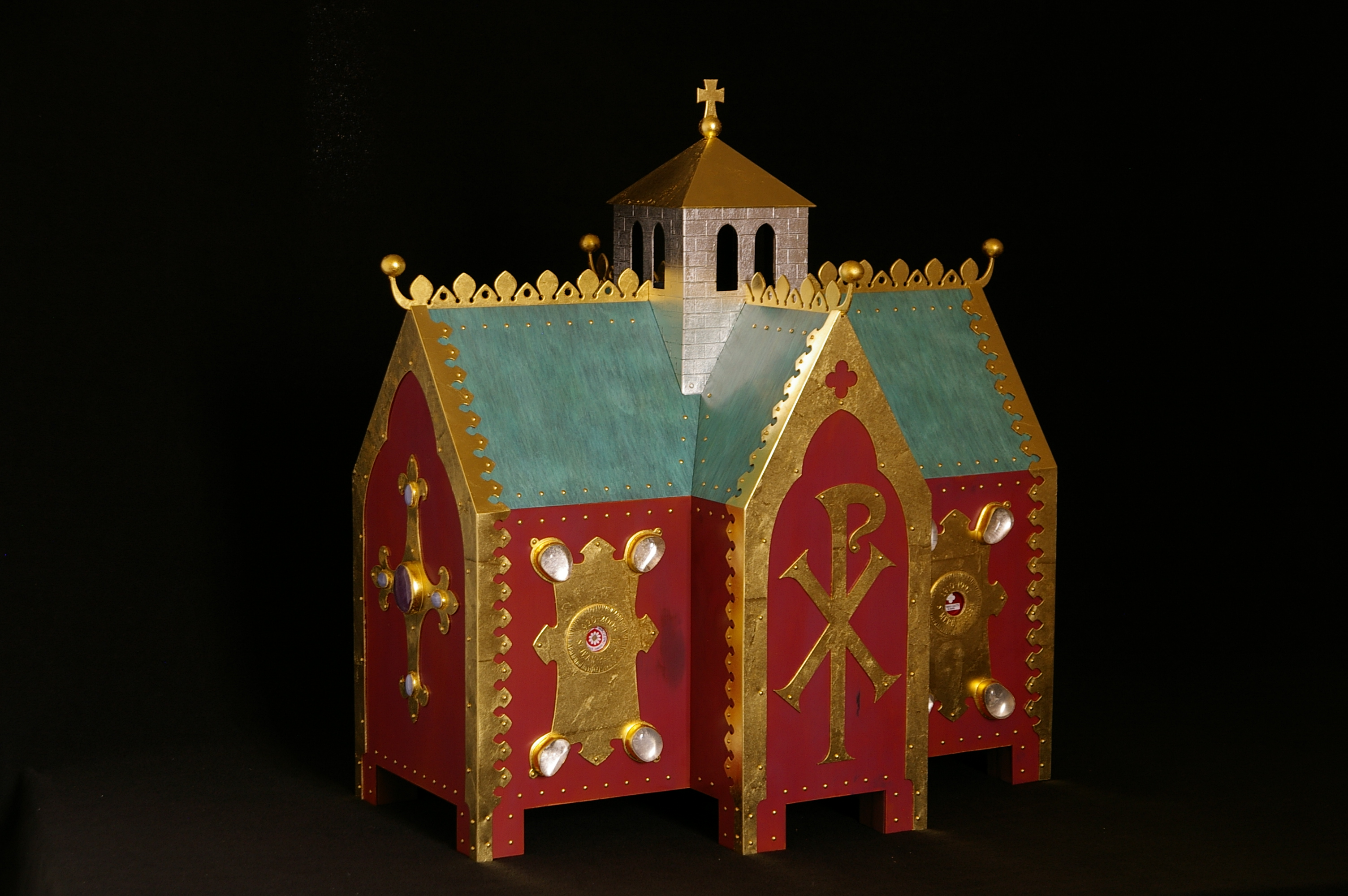 Reliquaire l'Île Bouchard par Louis-Guillaume Piéchaud, pour Jean-Paul II et Mère Teresa.